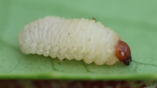 Larve des Eichelbohrers (Curculio glandium), am 11.10.2017 in der Schwetzinger Hardt an angebohrten Eicheln gefunden.